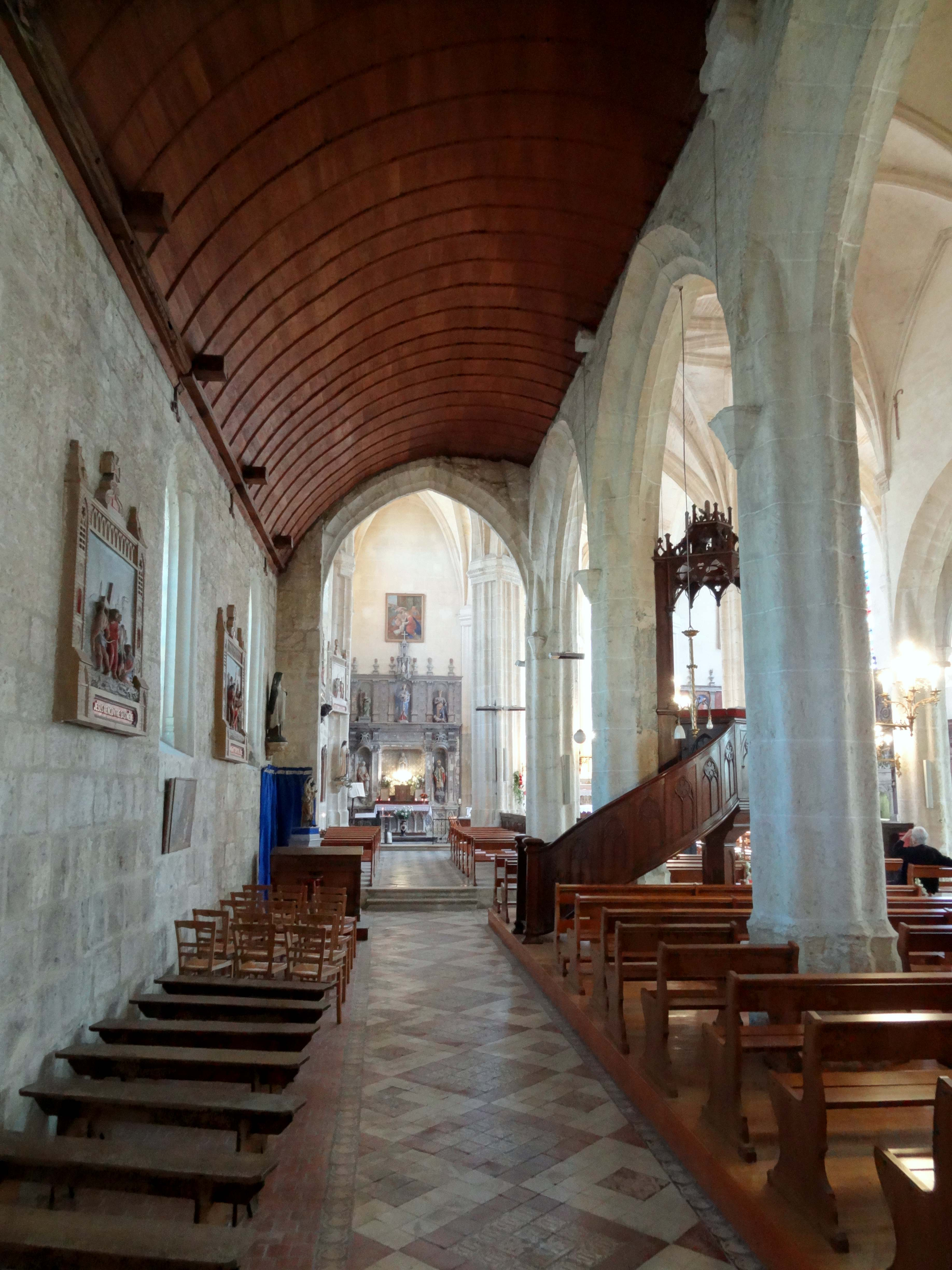 Intérieur de l'église - voir titre.